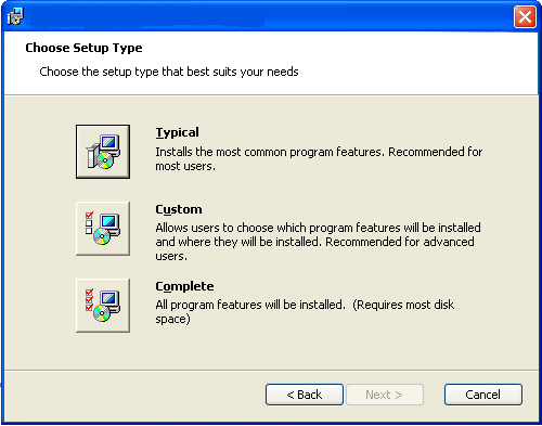 Pilt millel kujutakse installeerimise protsessi